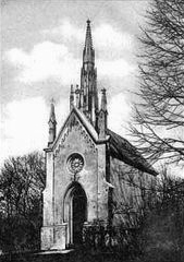 Kaplica św. Barbary na Górze Gryca w Bytomiu-Miechowicach, fotografia stanowi fragment pocztówki.